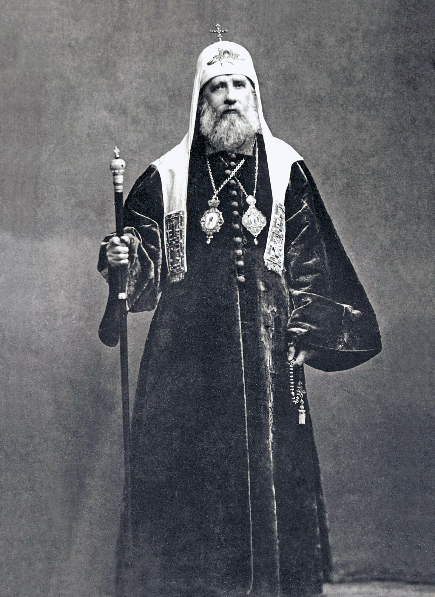 Photo: Der Patriarch und Heilige der Russisch-Orthodoxen Kirche Tichon (Patriarch von Moskau) (1865 – 1925)